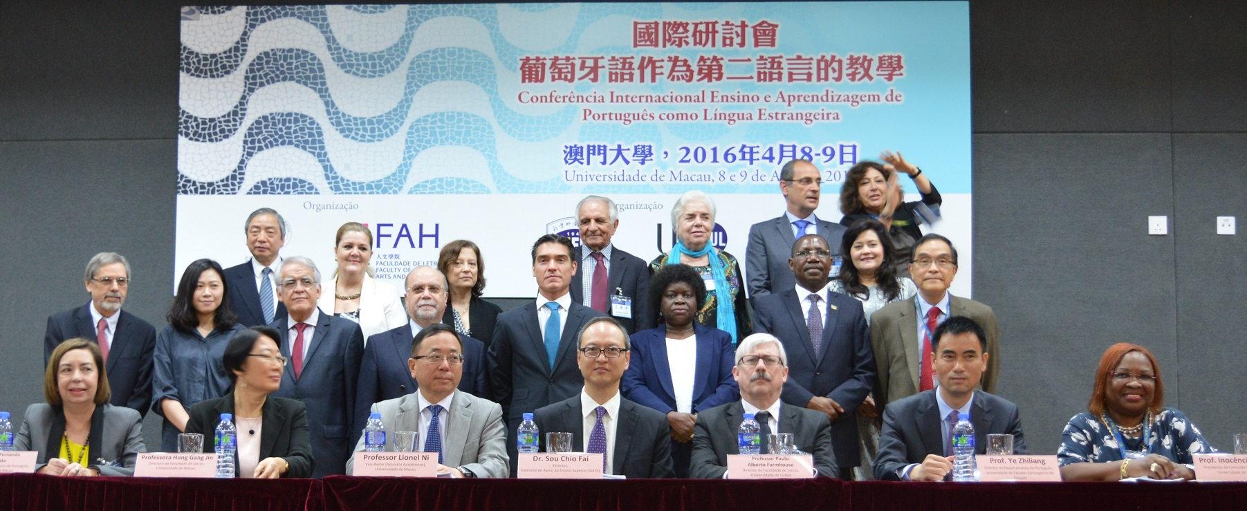 マカオ大学国際シンポジウム